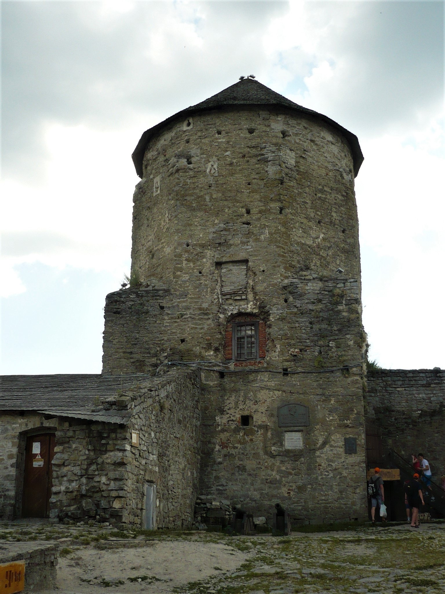 Twierdza w Kamieńcu Podolskim. Baszta Papieska